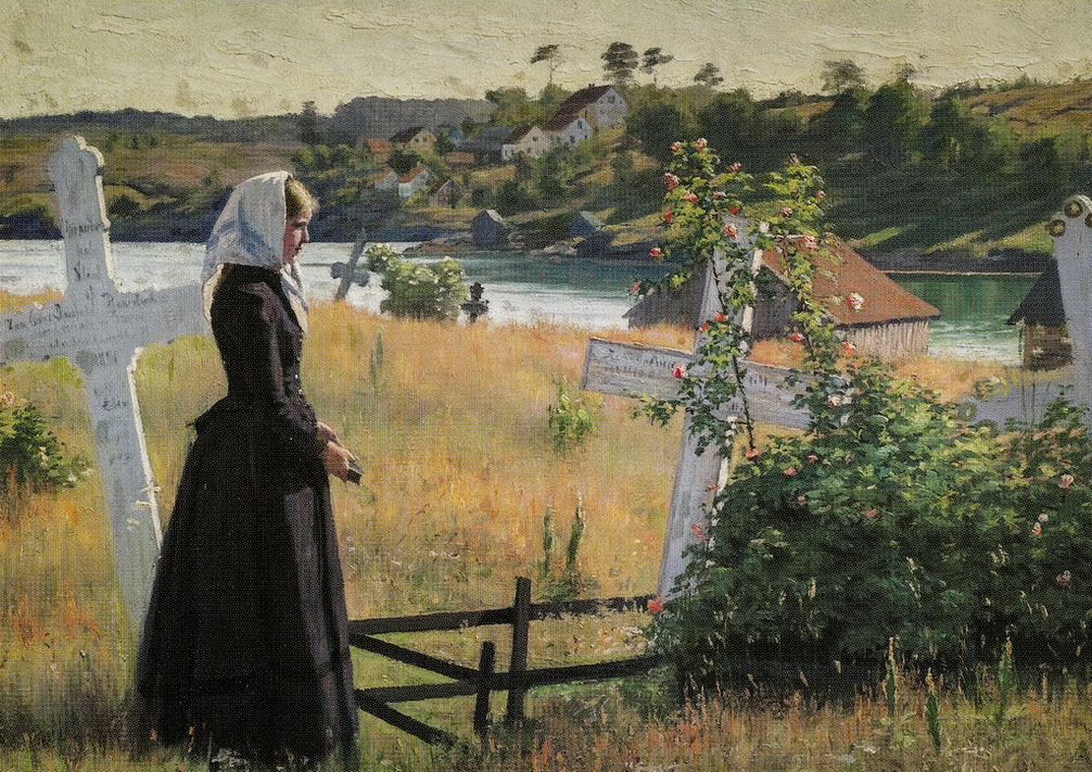 Po kirkegarden